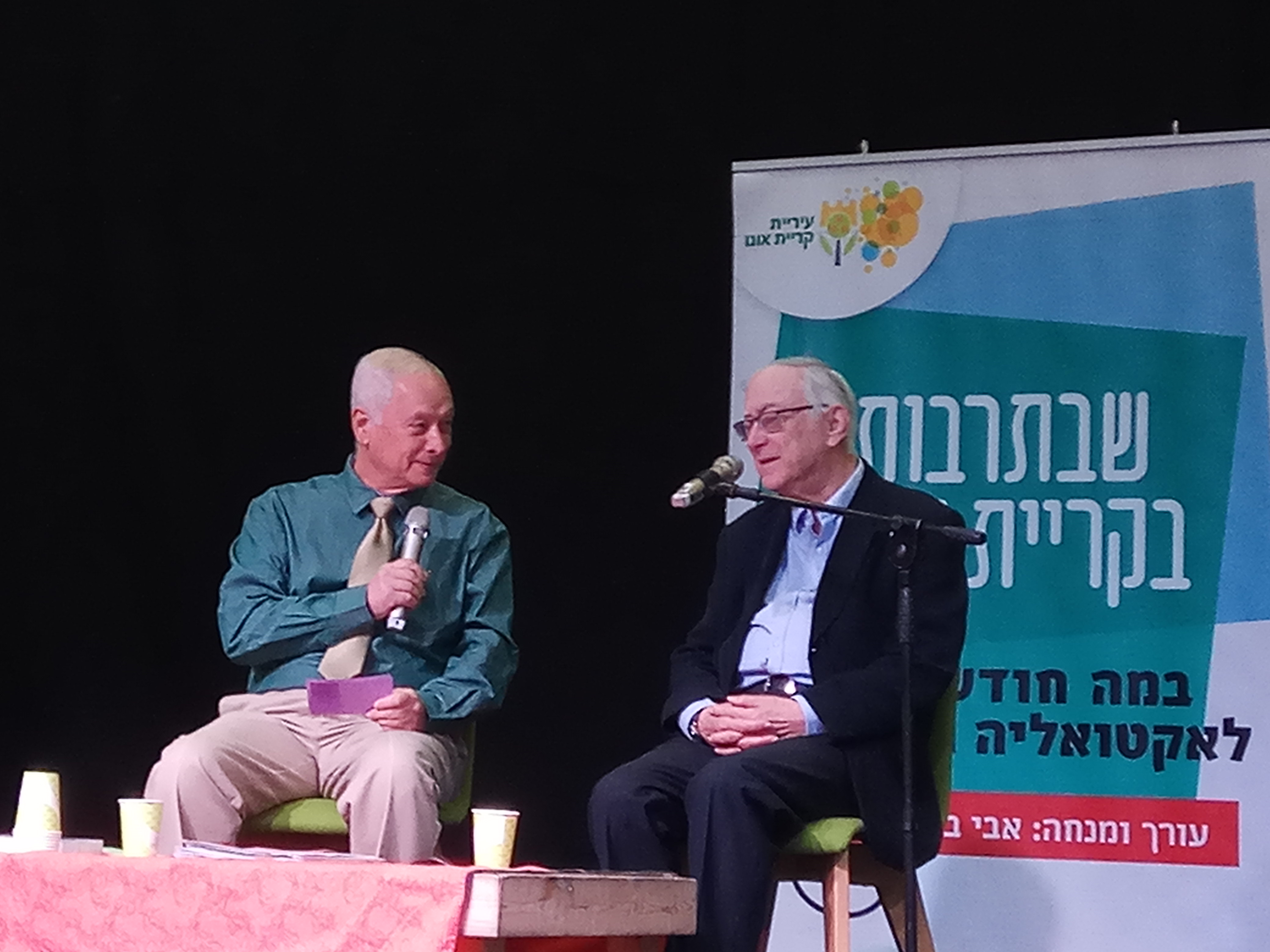 אסא כשר באירוע שבתרבות בקריית אונו עם אבי בטלהיים